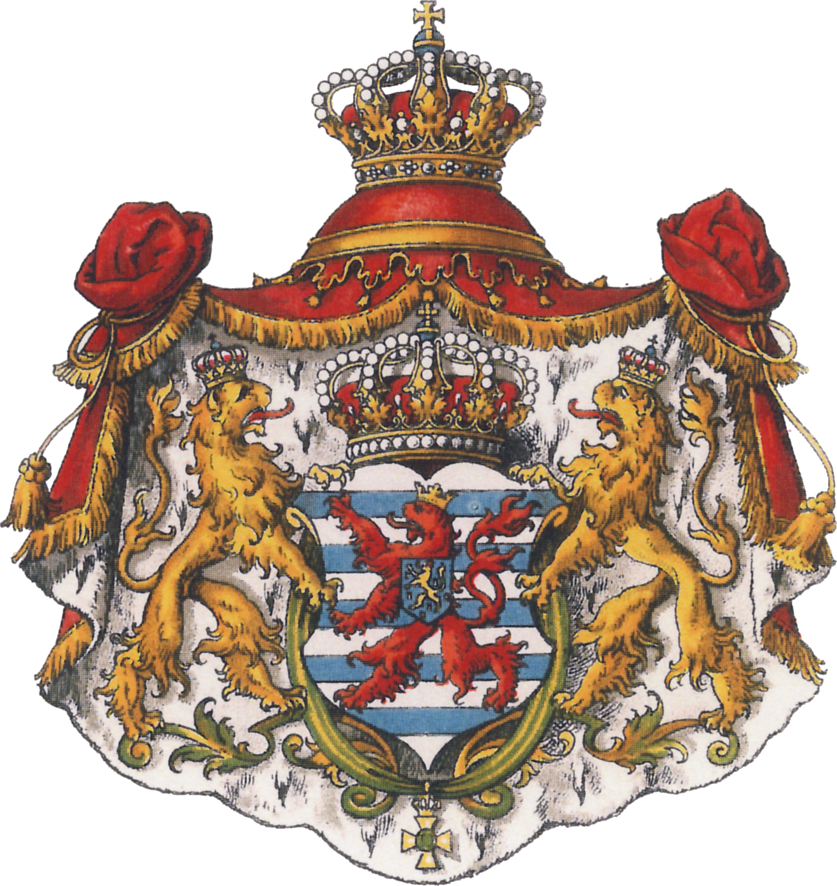 "Fig. 3. Wappen des Grossherzogtums Luxemburg Luxemburg führt in dem von Silber und Blau zehnmal quergeteilten Schilde einen gekrönten roten Löwen mit Doppelschweif. Die Brust der Löwen ist mit dem Schilde von Nassau (im blauen mit sieben goldenen Schindeln bestreuten Felde ein rot gekrönter und bewehrter goldener Löwe), der seit 8. Dezember 1890 regierenden Dynastie belegt. Der grossherzoglich gekrönte Schild ist von dem grünen, orangefarben gestreifen Bande des Ordens der Eichenkrone umzogen und wird von zwei auf goldenem Ornamente fussenden, grossherzoglich gekrönten, goldenen Löwen gehalten. Das Ganze steht unter einem hermelingefütterten, purpurroten Wappenzelte, das oben mit der Grossherzogskrone geschmückt ist."